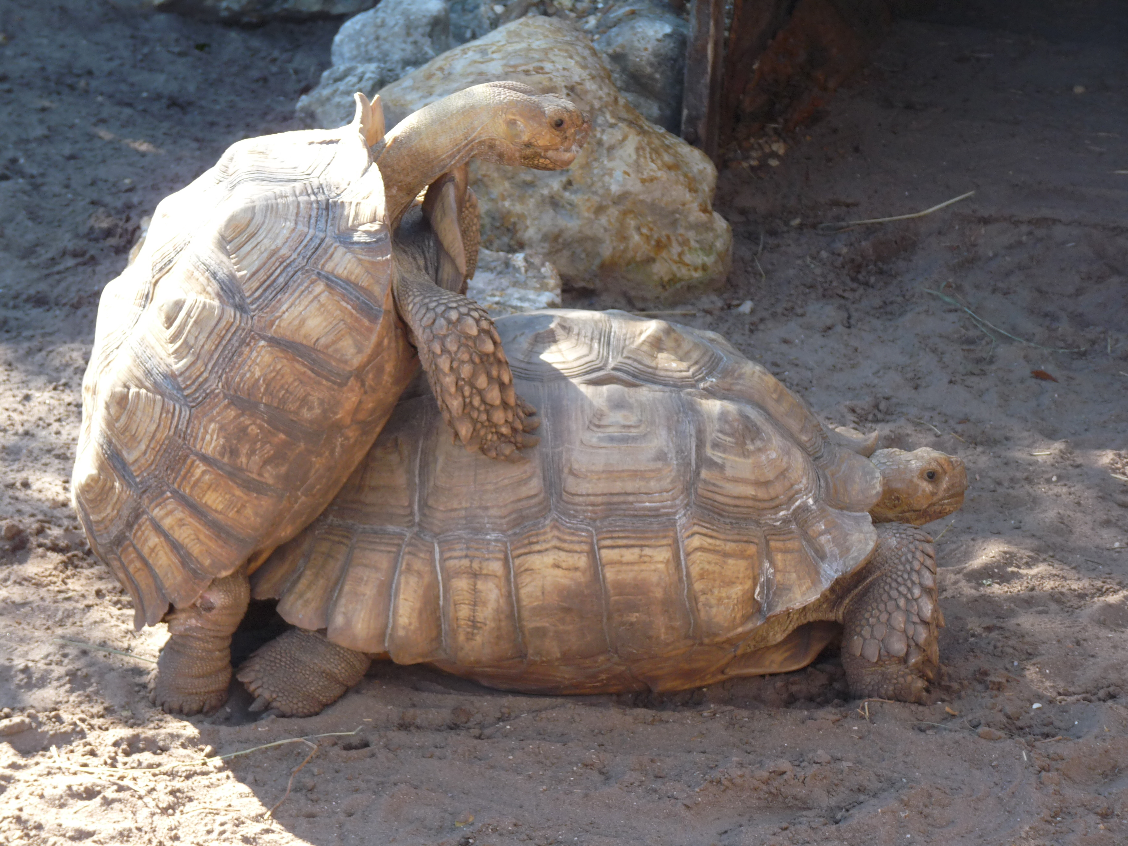 Tortues sillonnées en captivité en Floride